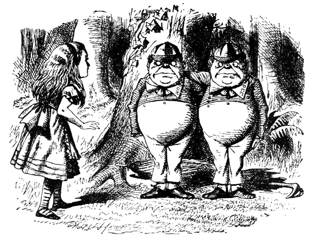 гравюра Джона Тенниела